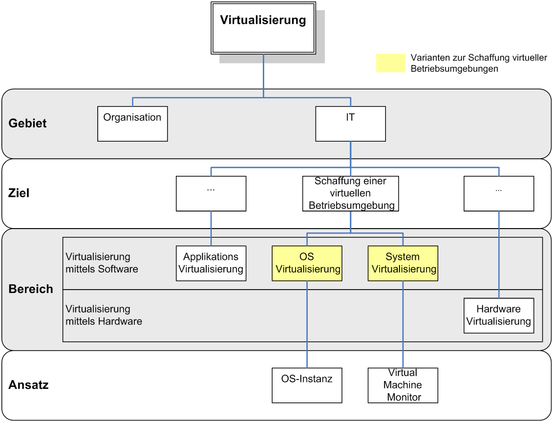 Einordnung von Virtualisierungstechnologien zur Schaffung virtueller Betriebsumgebungen im Gesamtkontext der Virtualisierung